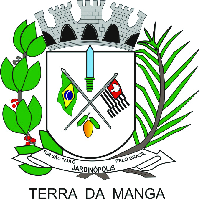 Brasao da Cidade de Jardinopolis